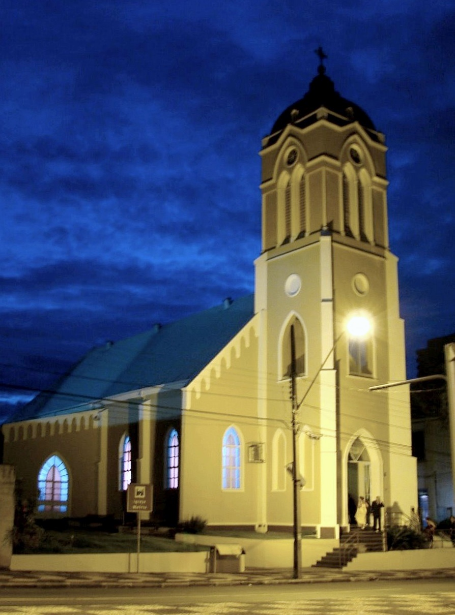 Catedral de São João Batista - Igreja Matriz de Foz do Iguaçu, Paraná, Sul do Brasil. Construção da primeira metade do séc. XX, situa-se na av. Jorge Schimmelpfeng, 70, centro.